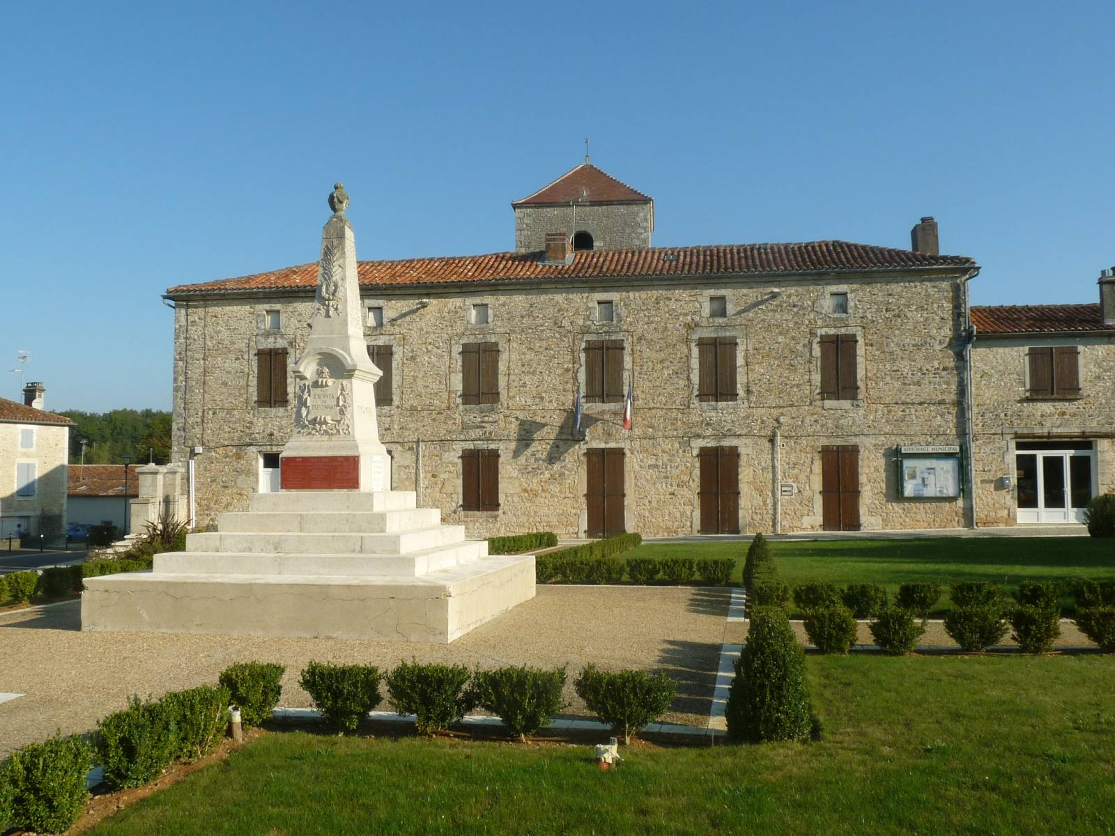 mairie et monument aux morts de Taponnat-Fleurignac (16), France